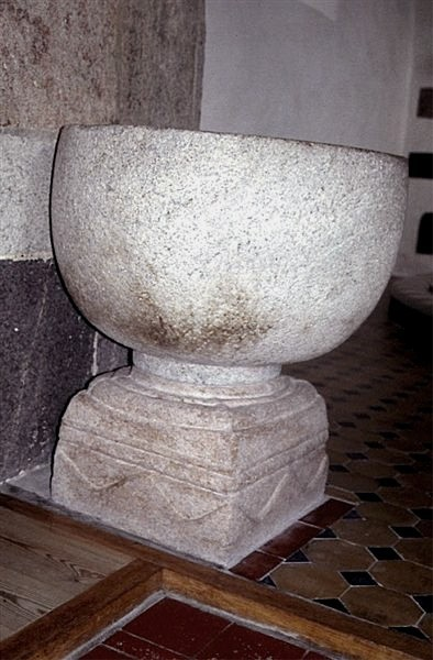 Almind Kirke (Viborg Kommune), Døbefont